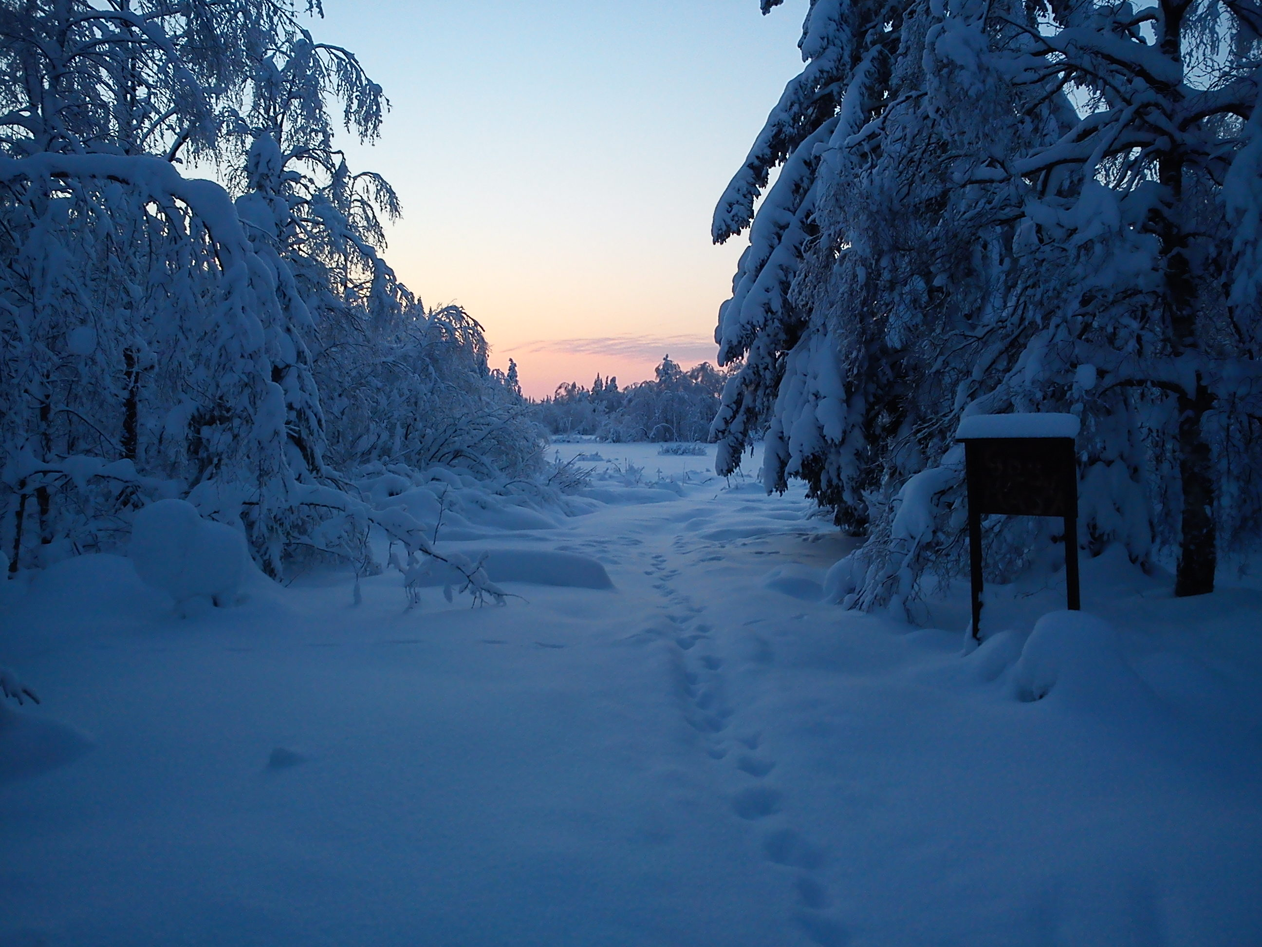 Natura 2000-området Gröna mad på platåberget Mösseberg i Falköpings kommun i Västergötland i Sverige. Kortet är taget åt sydväst. Under gynnsamma vintrar går det ett skidspår över Gröna mads mossmarker.